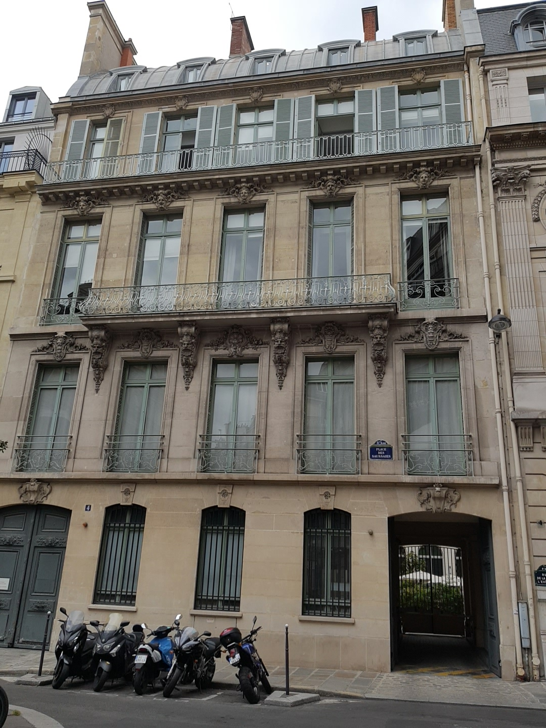 4, place des Saussaies, Paris 8e.